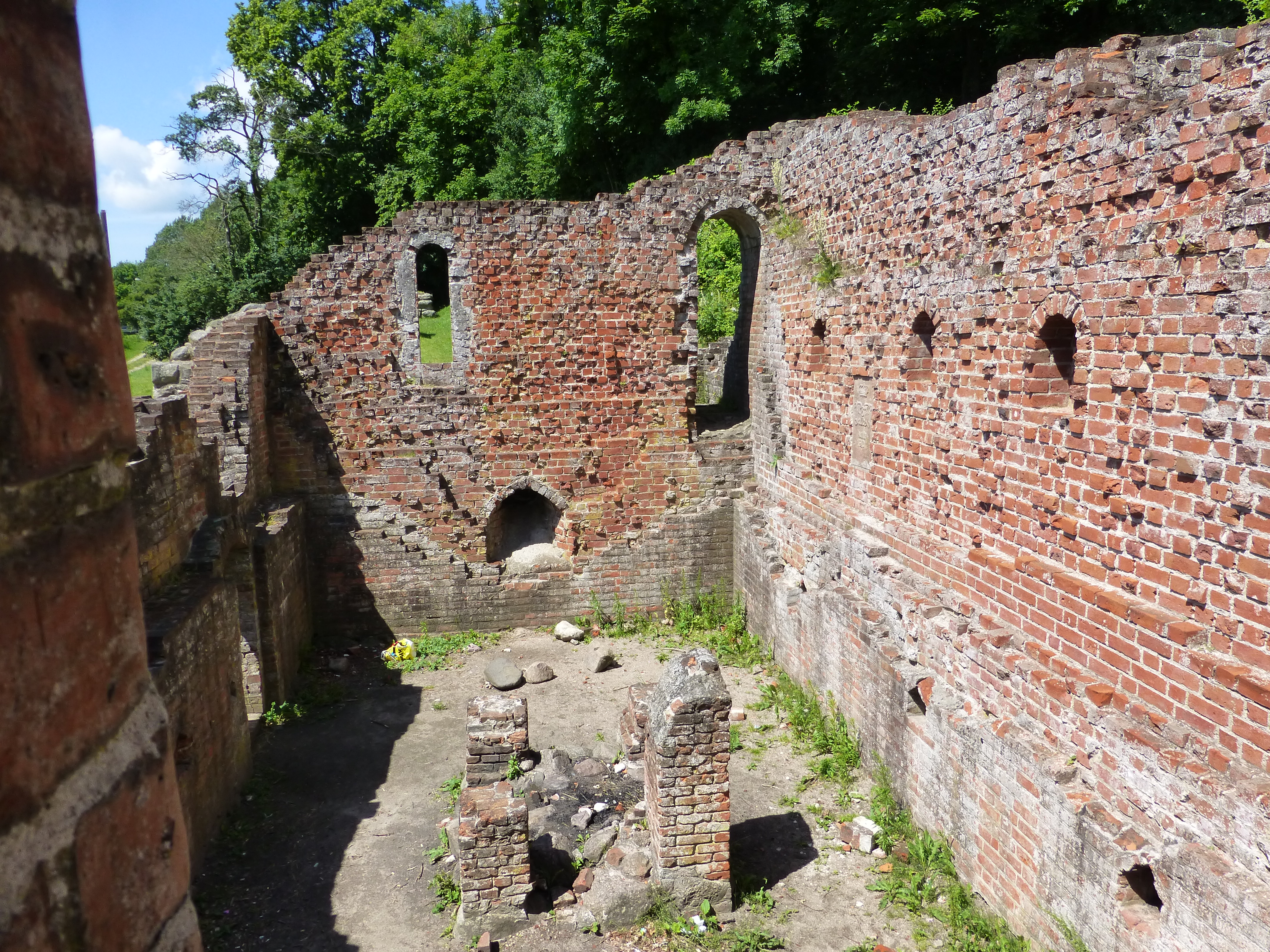 Ruinerne 2012